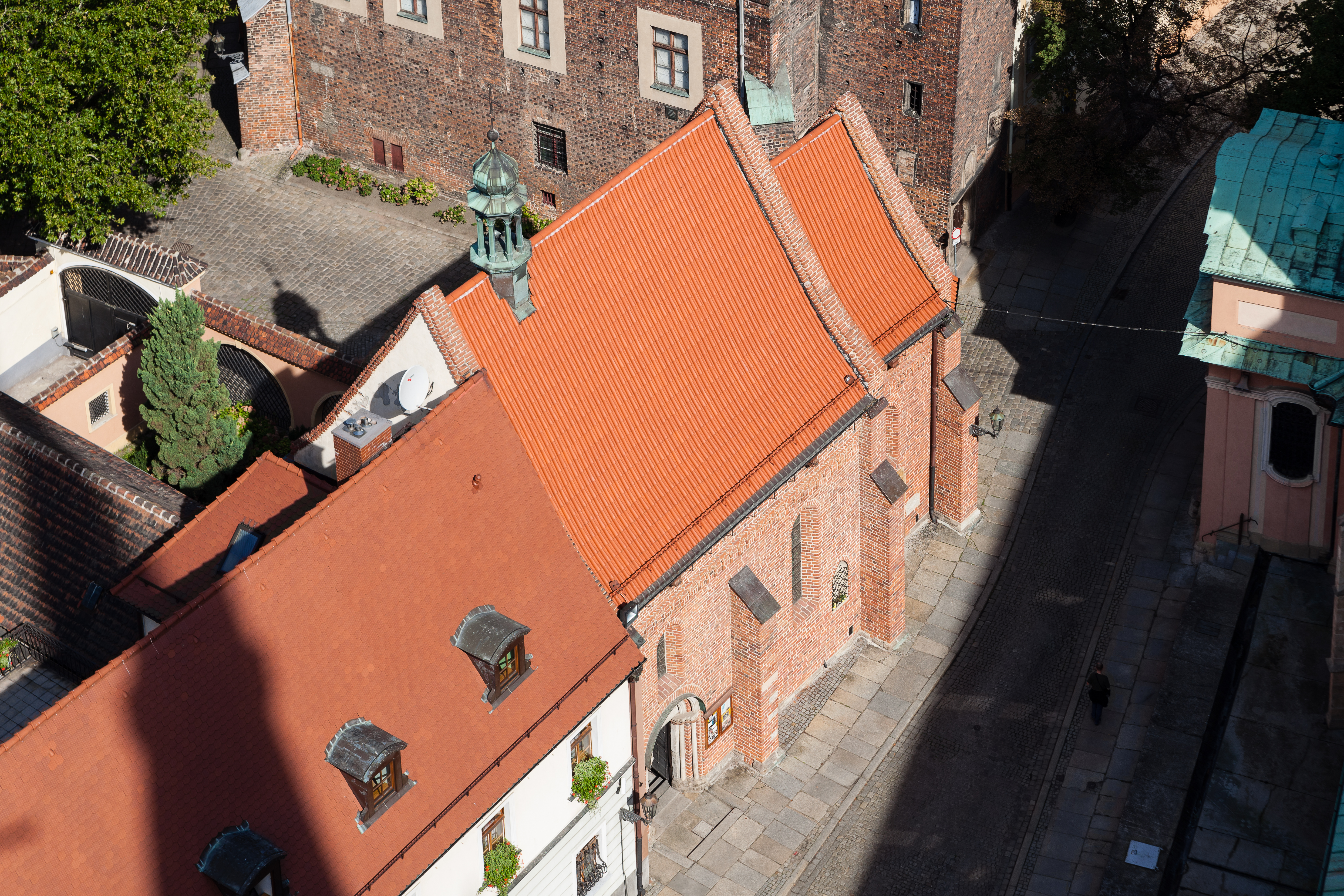 Plebania